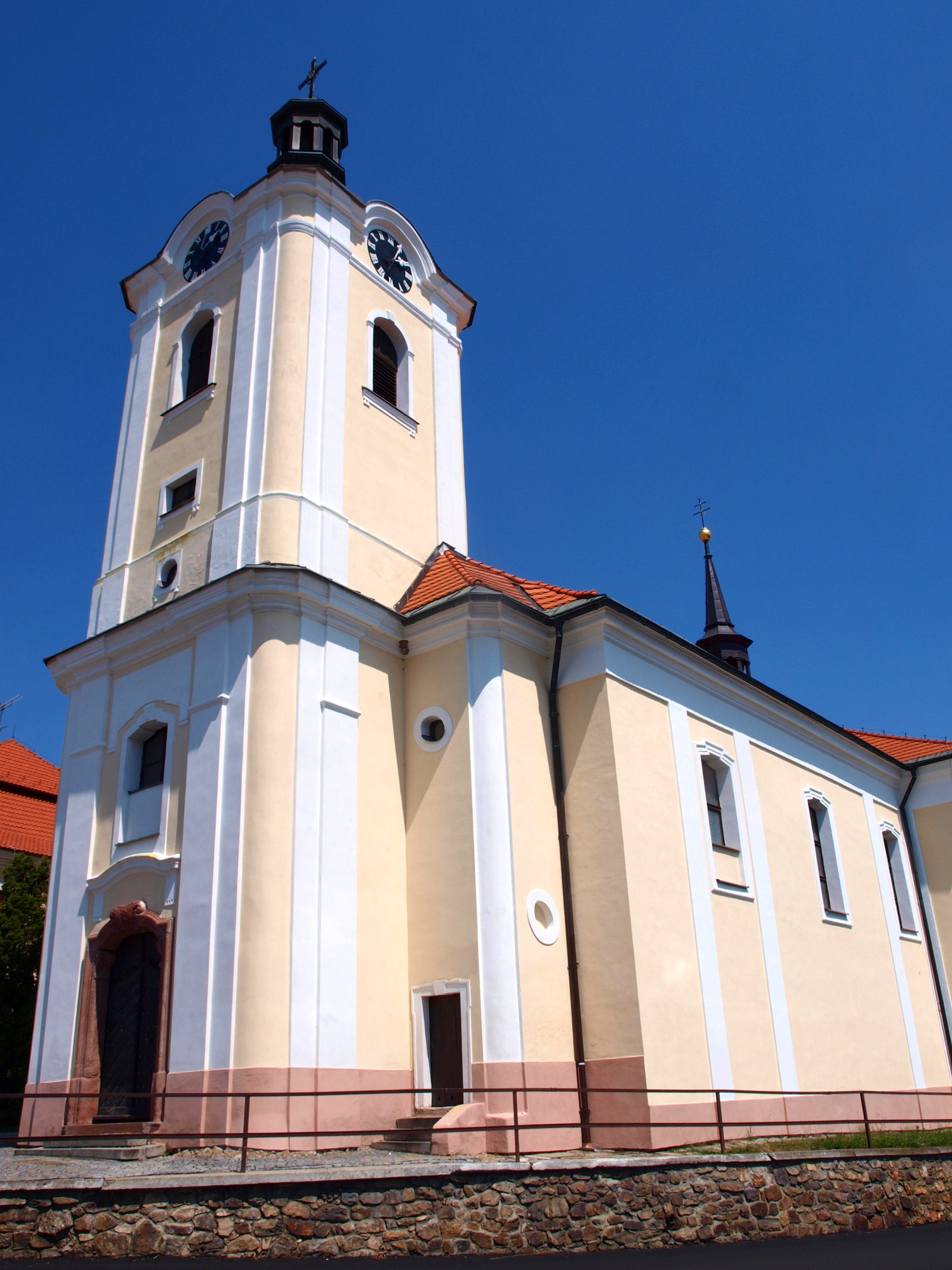 Divišov